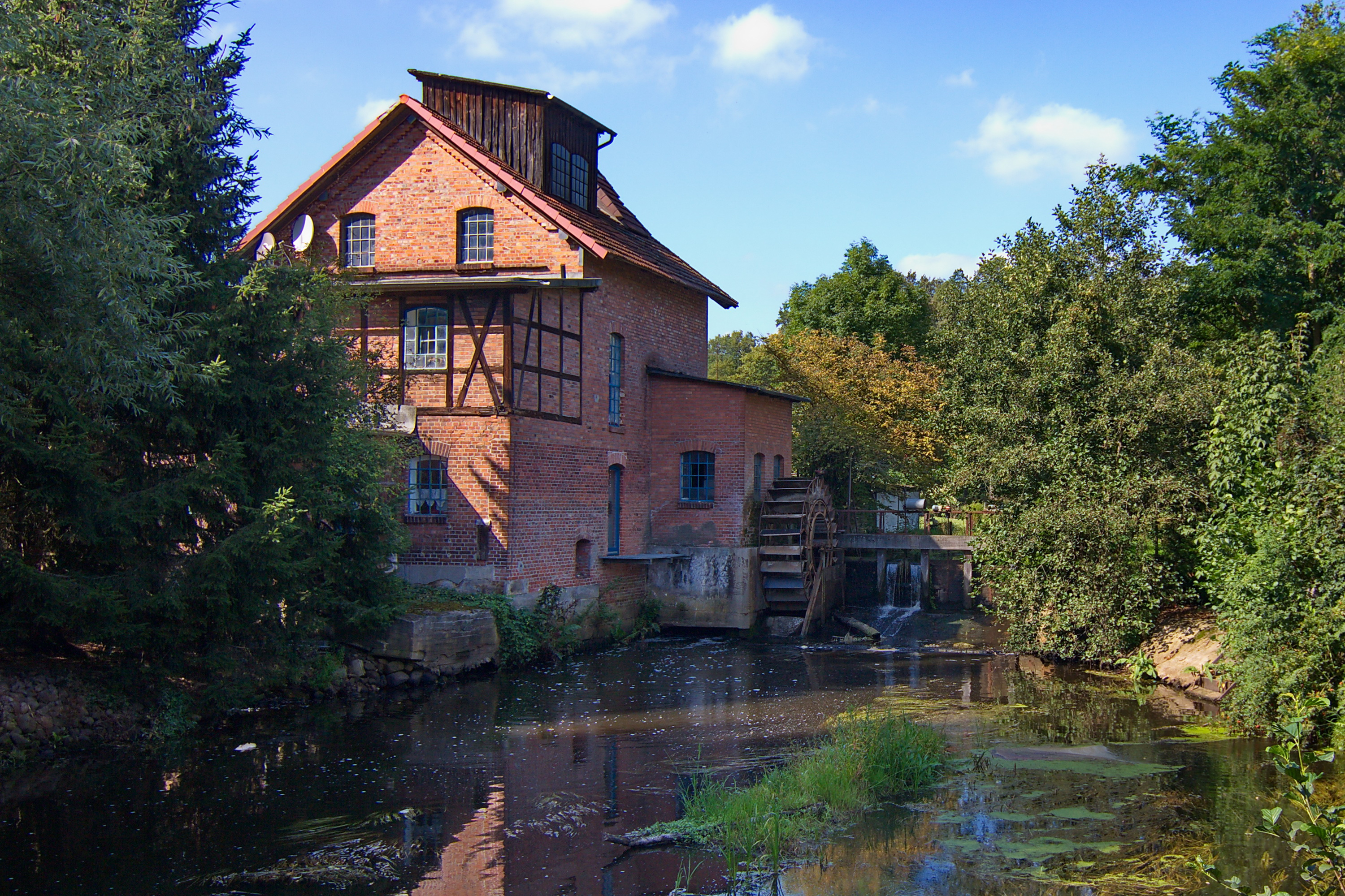 Das heutige Gebäude der Wassermühle in Beedenbostel an der Aschau wurde 1905 nach einem Brand auf der Vorgängermühle errichtet, die im Jahr 1649 erstmals urkundlich erwähnt und bis 1920 im Vollerwerb betrieben wurde. Heute treibt das Mühlrad einen Stromgenerator für den Eigenbedarf. In den Räumen wird u.a. ein Cafe betrieben.